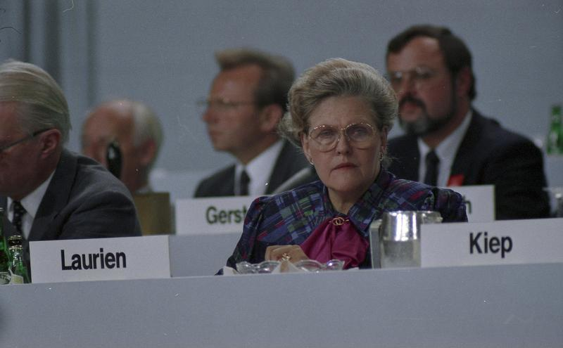 7./8.10.1986 34. Bundesparteitag der CDU in der Rheingoldhalle, Mainz (6.-8.10.1986)